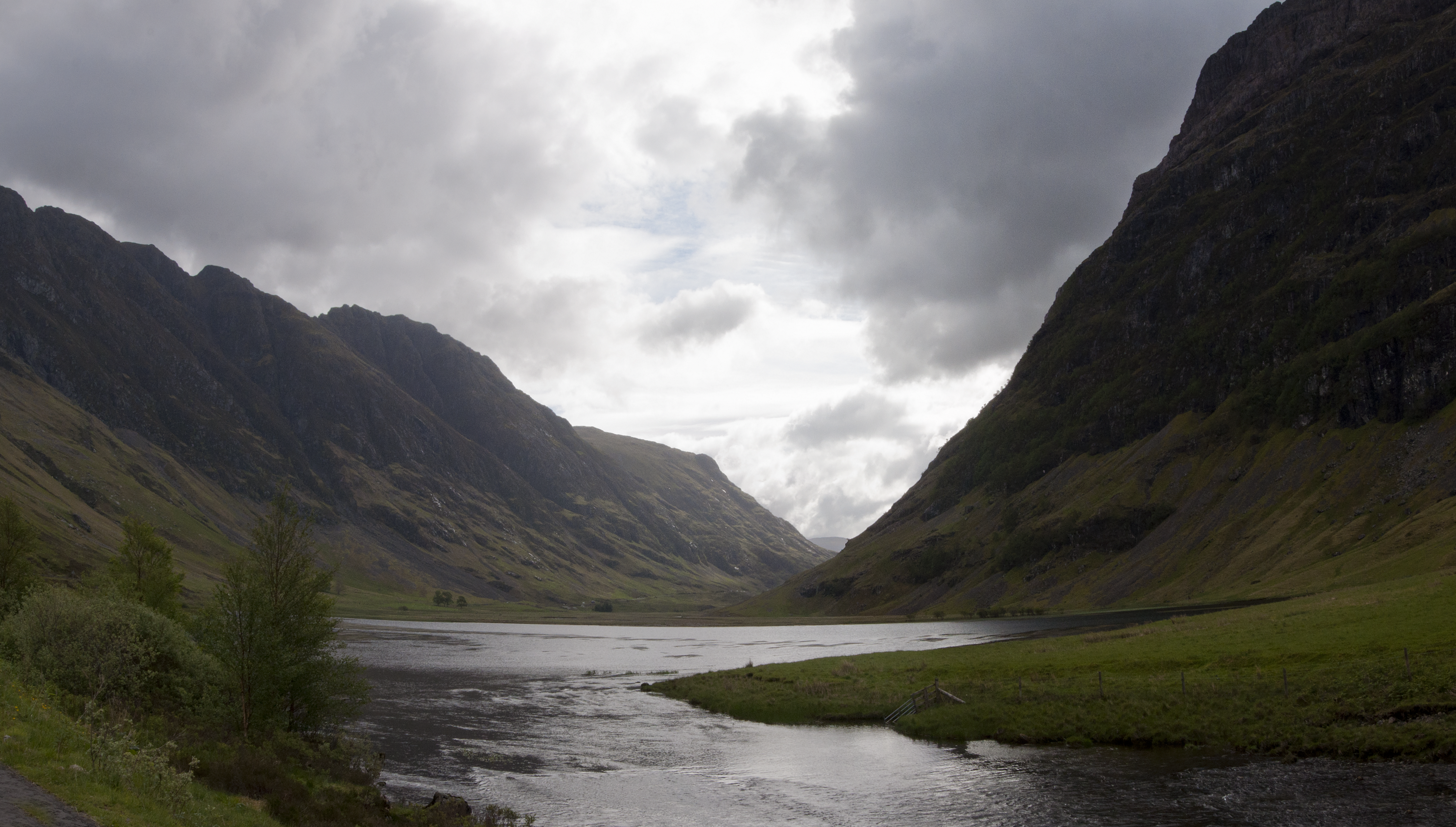 Loch Achtriochtan in Schotland